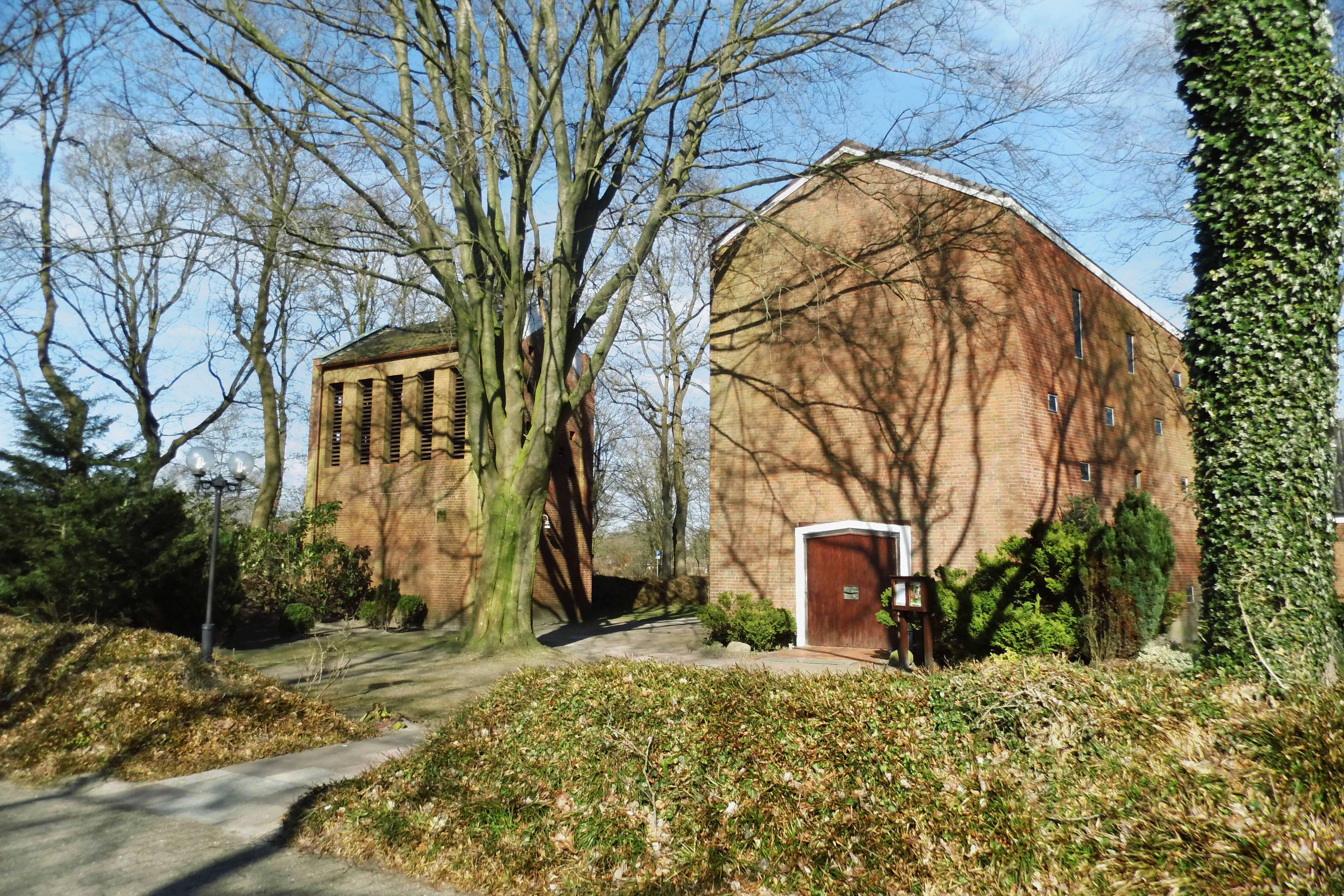 Evangelisch-lutherische Markuskirche in Tannenhausen (Stadtteil von Aurch), Ostfriesland, Niedersachsen, Deutschland